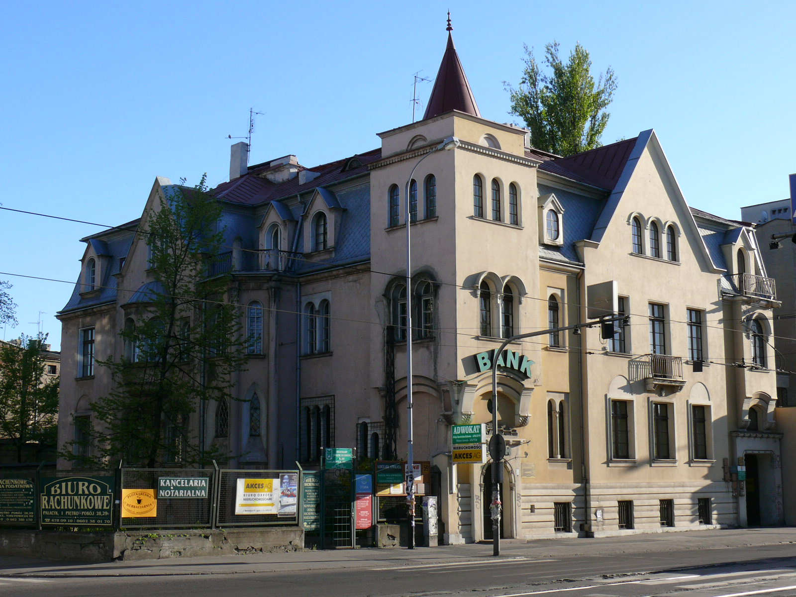 Willa Jezajasza (Szai) Kestenberga w Łodzi